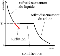 Evolution de la température lors de la solidification d'un corps pur : surfusion. Auteur : Christophe Dang Ngoc Chan (Cdang), réalisé avec un programme de dessin vectoriel. Licence GFDL Christophe Dang Ngoc Chan